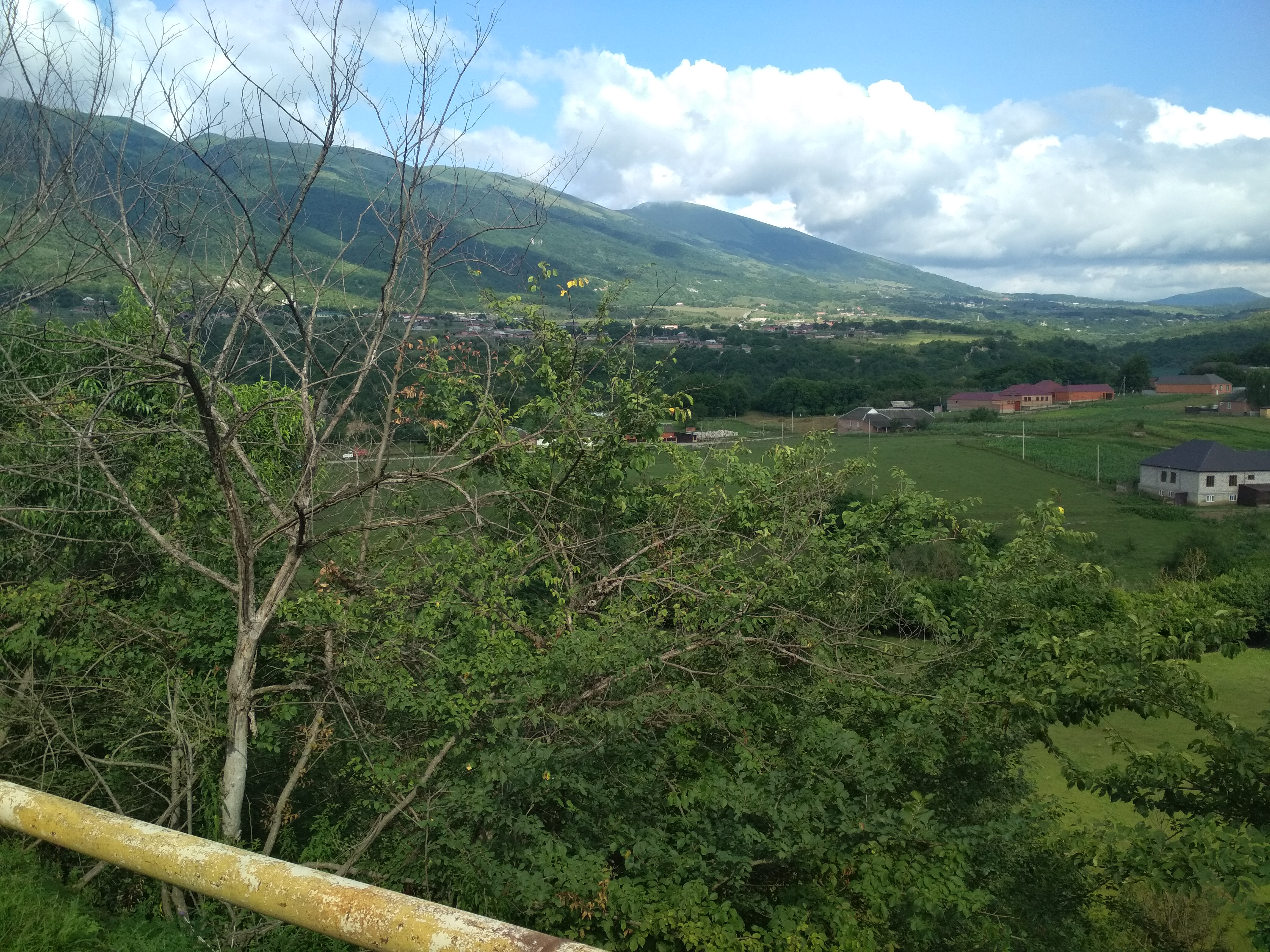 Нохчийн: ГӀуш-Кортара хьаьжча